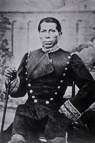 c.1860?